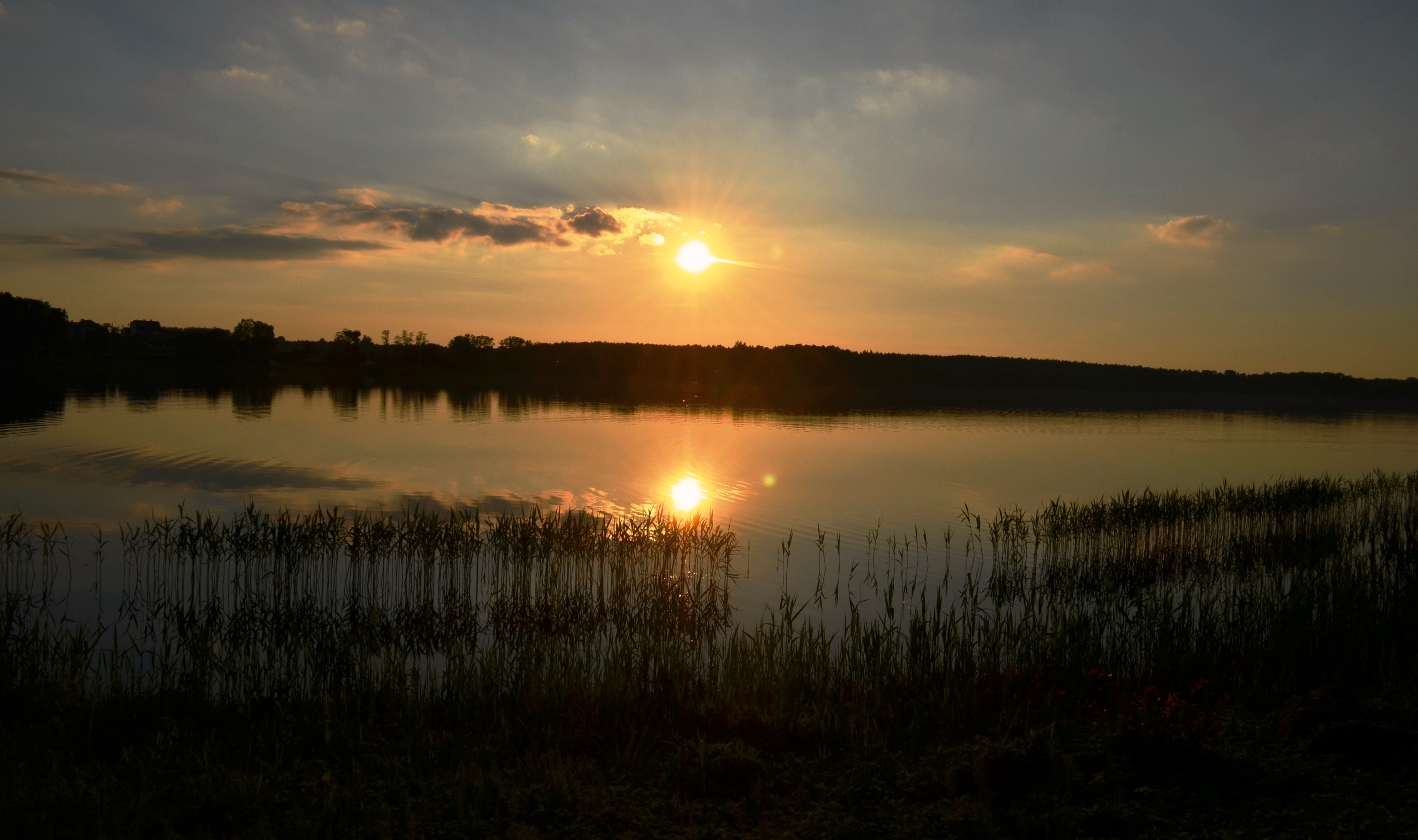 Totoriškių ežeras, Trakai